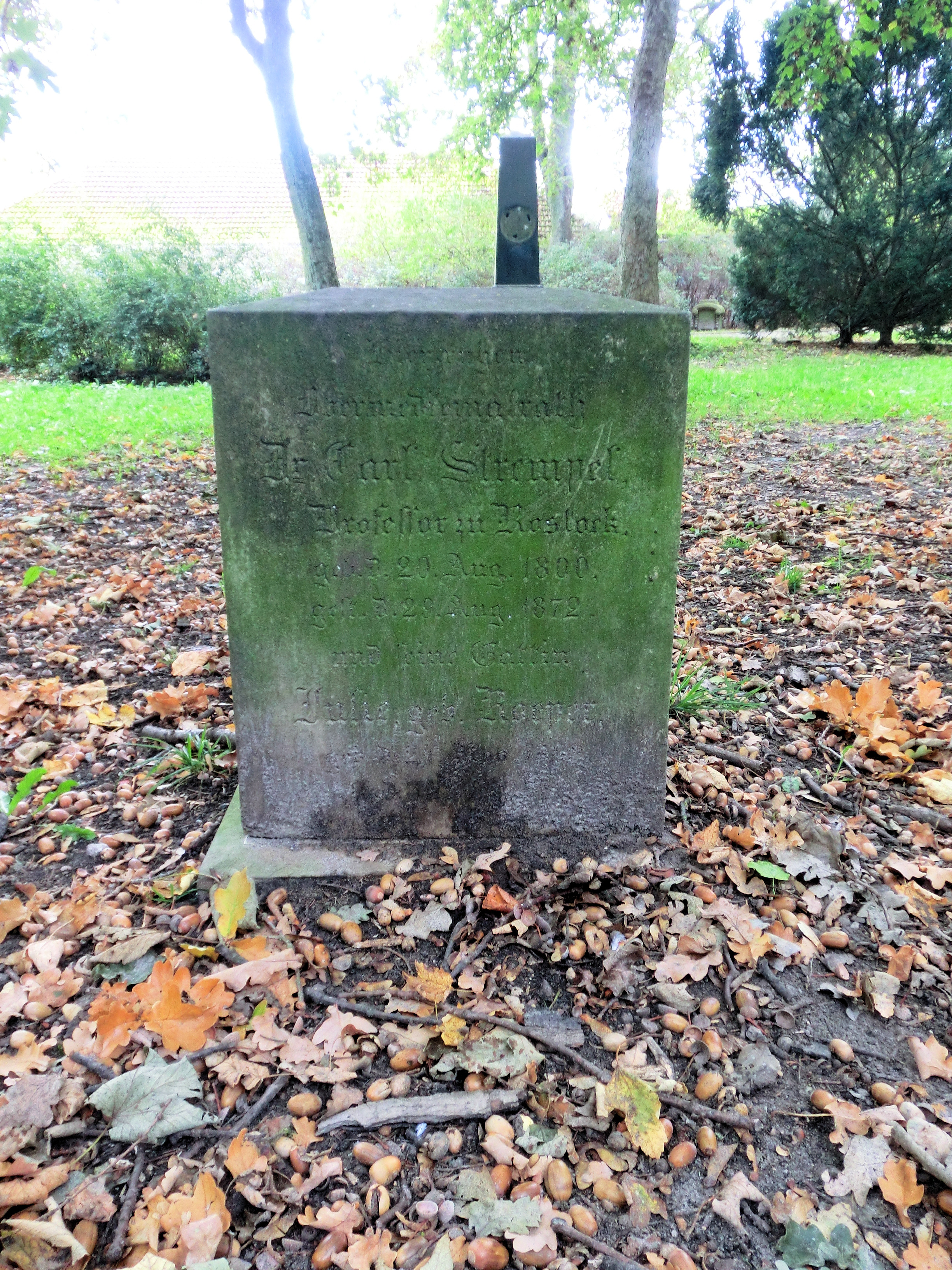 Lindenpark Rostock (ehemaliger Alter Friedhof), Grabstein Carl Strempel